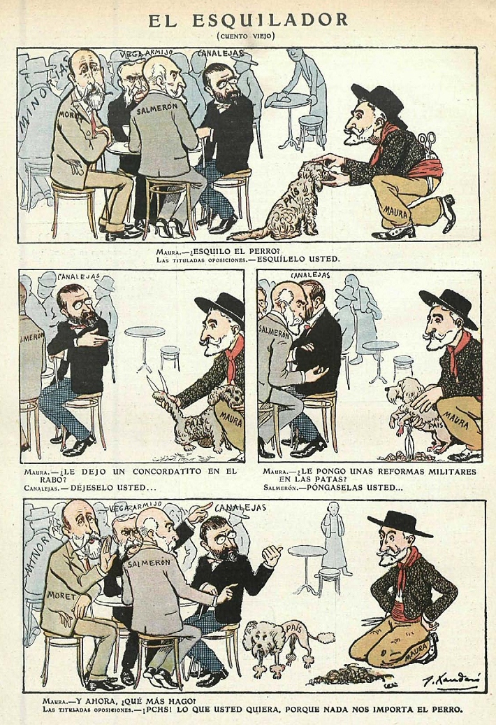 El esquilador, en la revista satírica española Gedeón.